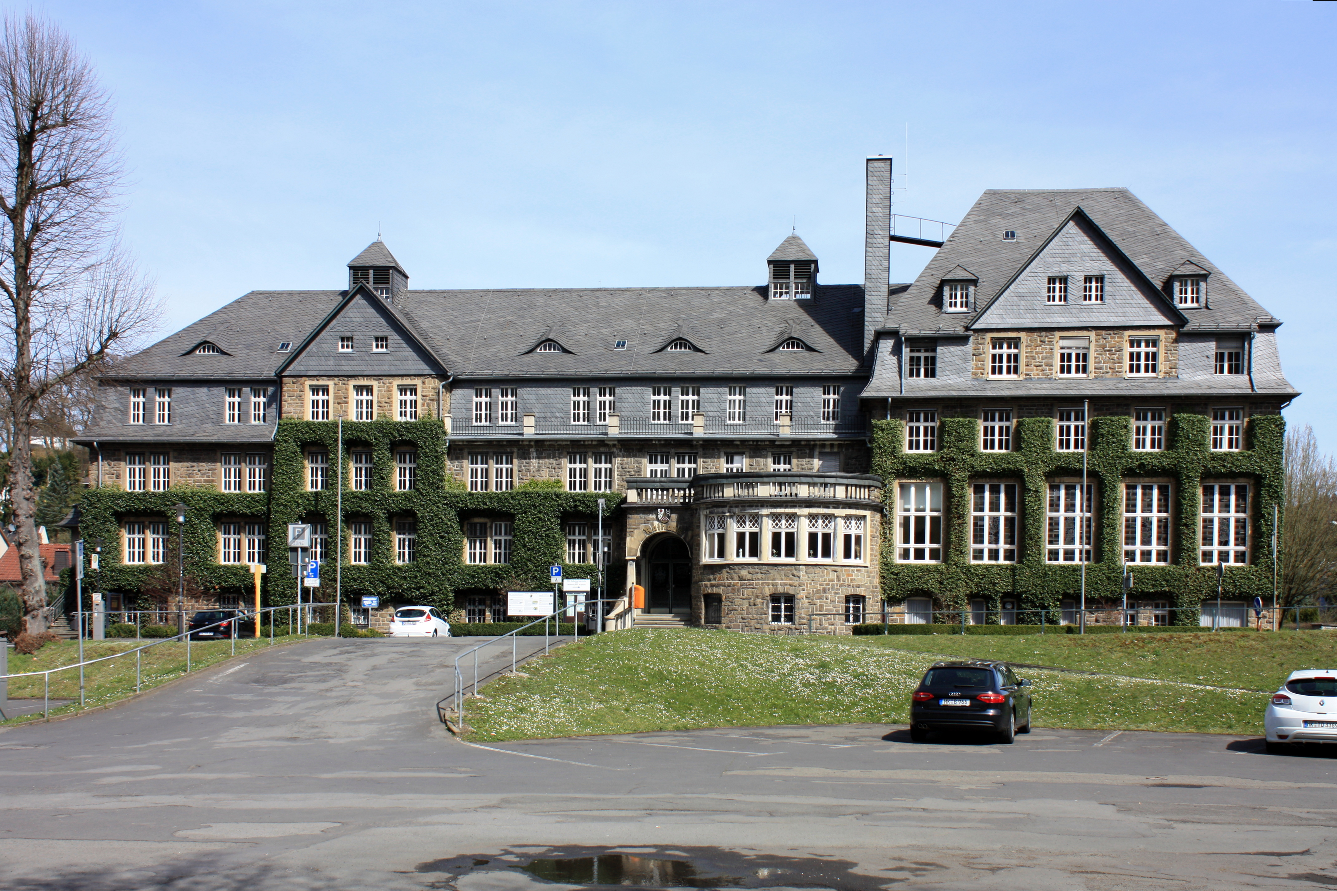 Rathaus im neubarockem Stil, erbaut 1910–1912. Seit 1982 ein Baudenkmal der Stadt Werdohl im Märkischen Kreis auf der Grundlage des Denkmalschutzgesetzes Nordrhein-Westfalen (DSchG NRW). IMG_6417